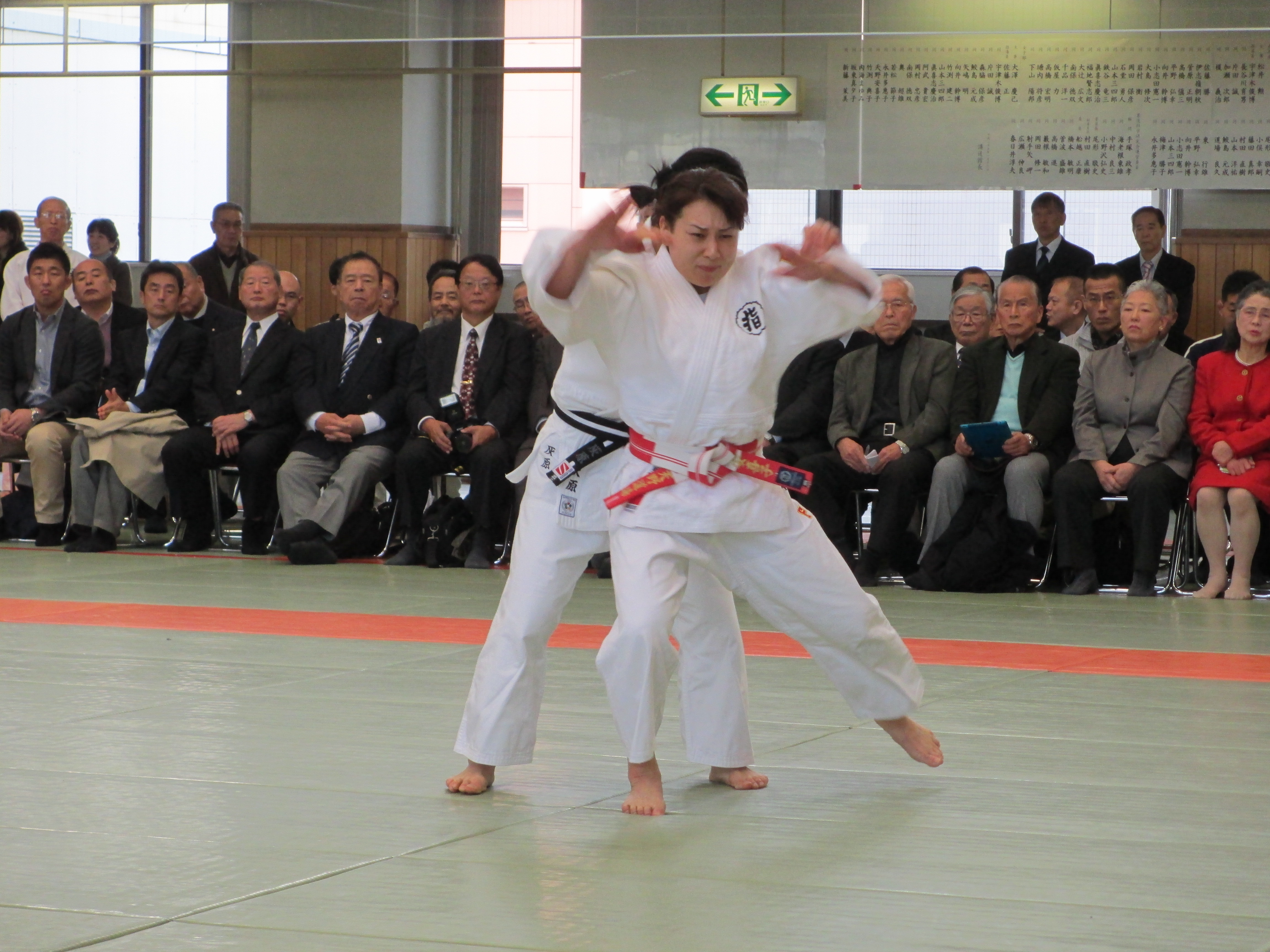 精力善用国民体育の技